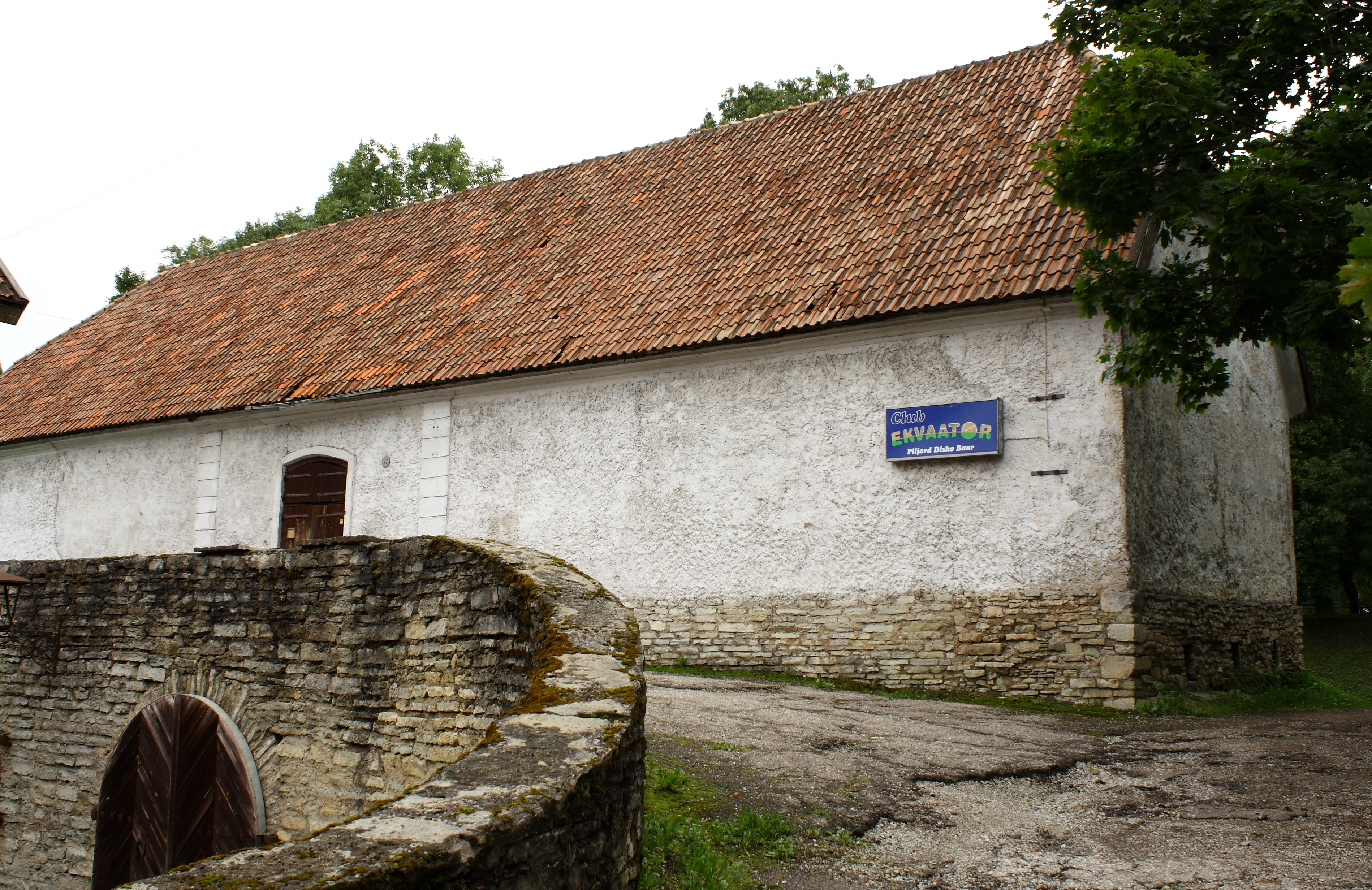 Paide magasiait, ehitismälestis, Tallinna tn 25